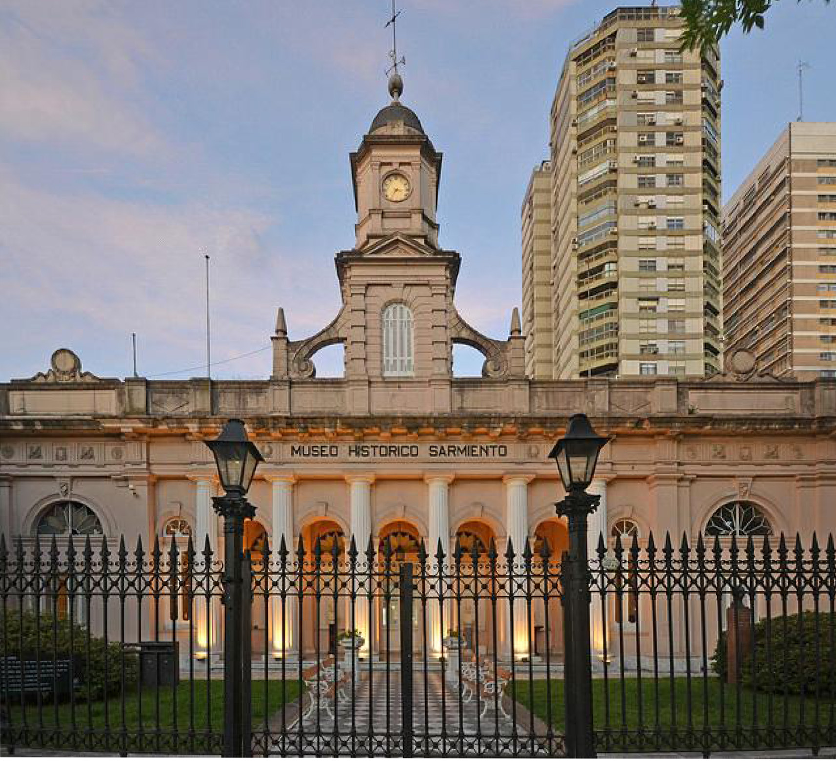 Fachada museo historico Sarmiento